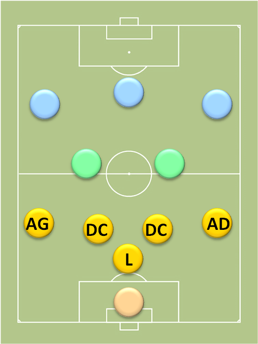 Positions_au_football_des_défenseurs_dans_un_5-2-3 (catenaccio)